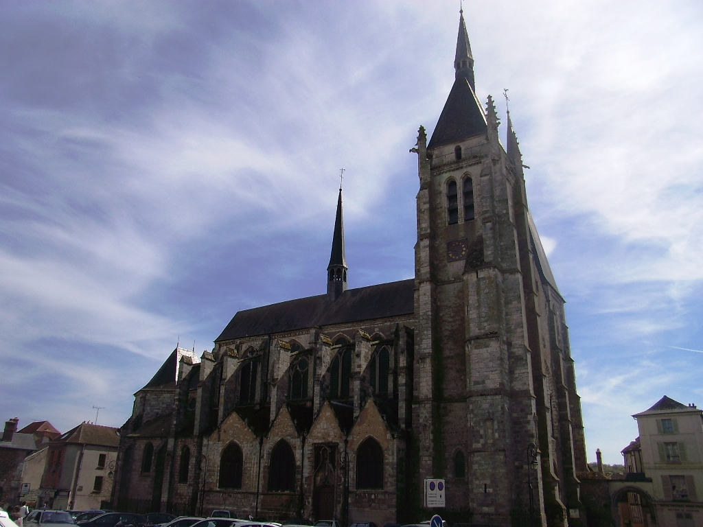 Eglise Saint-Germain-d'Auxerre de Dourdan